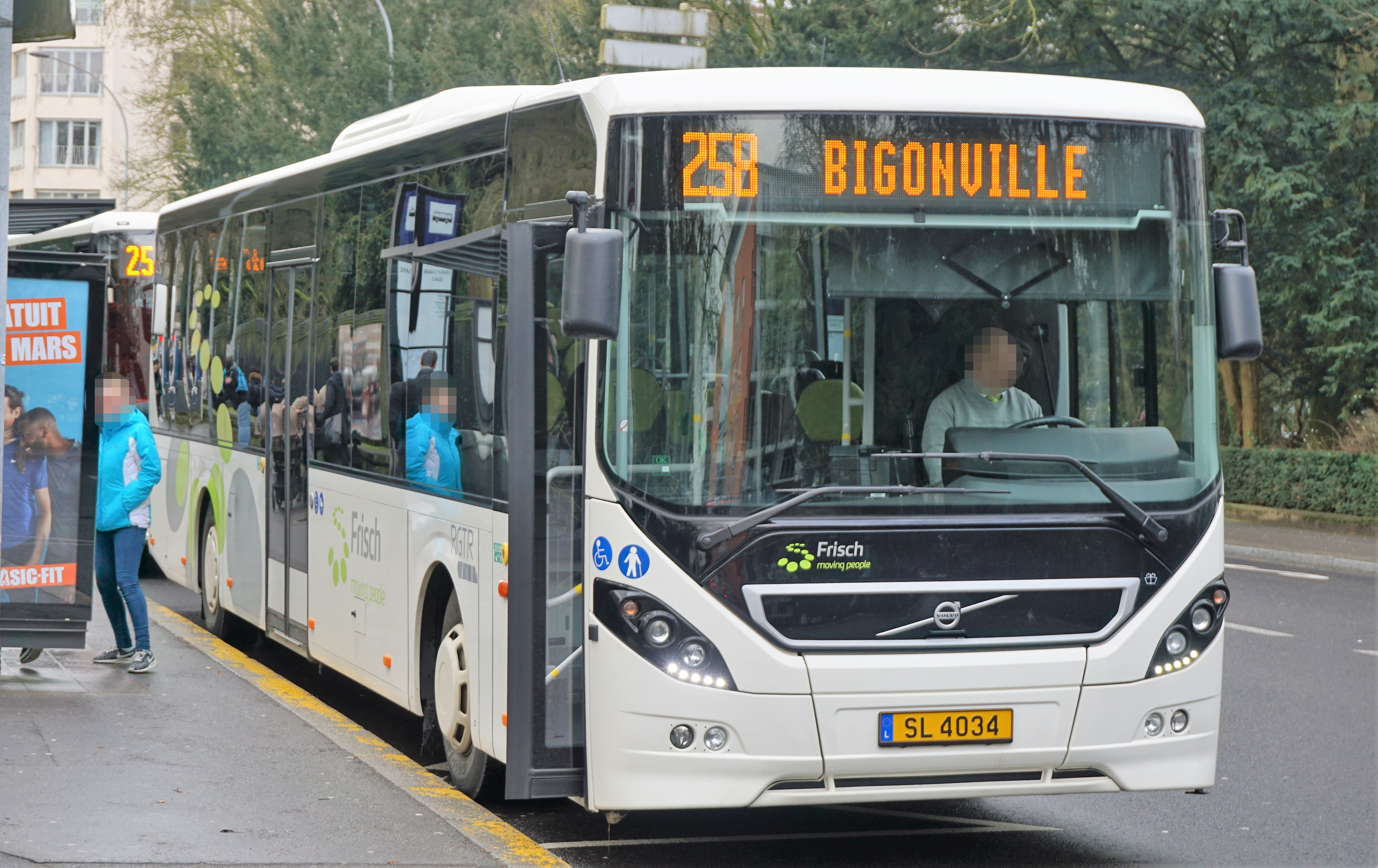 Luxembourg, avenue Emile-Reuter arrêt Charlys Gare, SSL4034, Frisch Rambrouch, ligne 258 direction Bigonville.